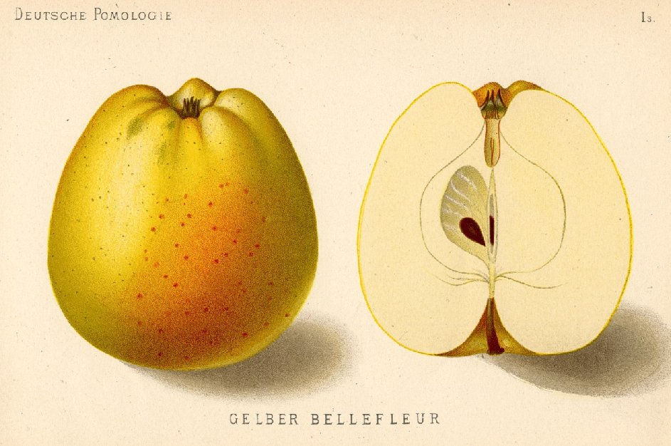 Apple - Pomme Belle Fleur Jaune